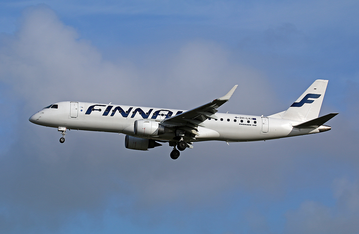 Hamburg 16 April 2015